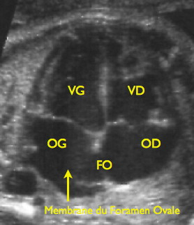 Foramen ovale - schéma